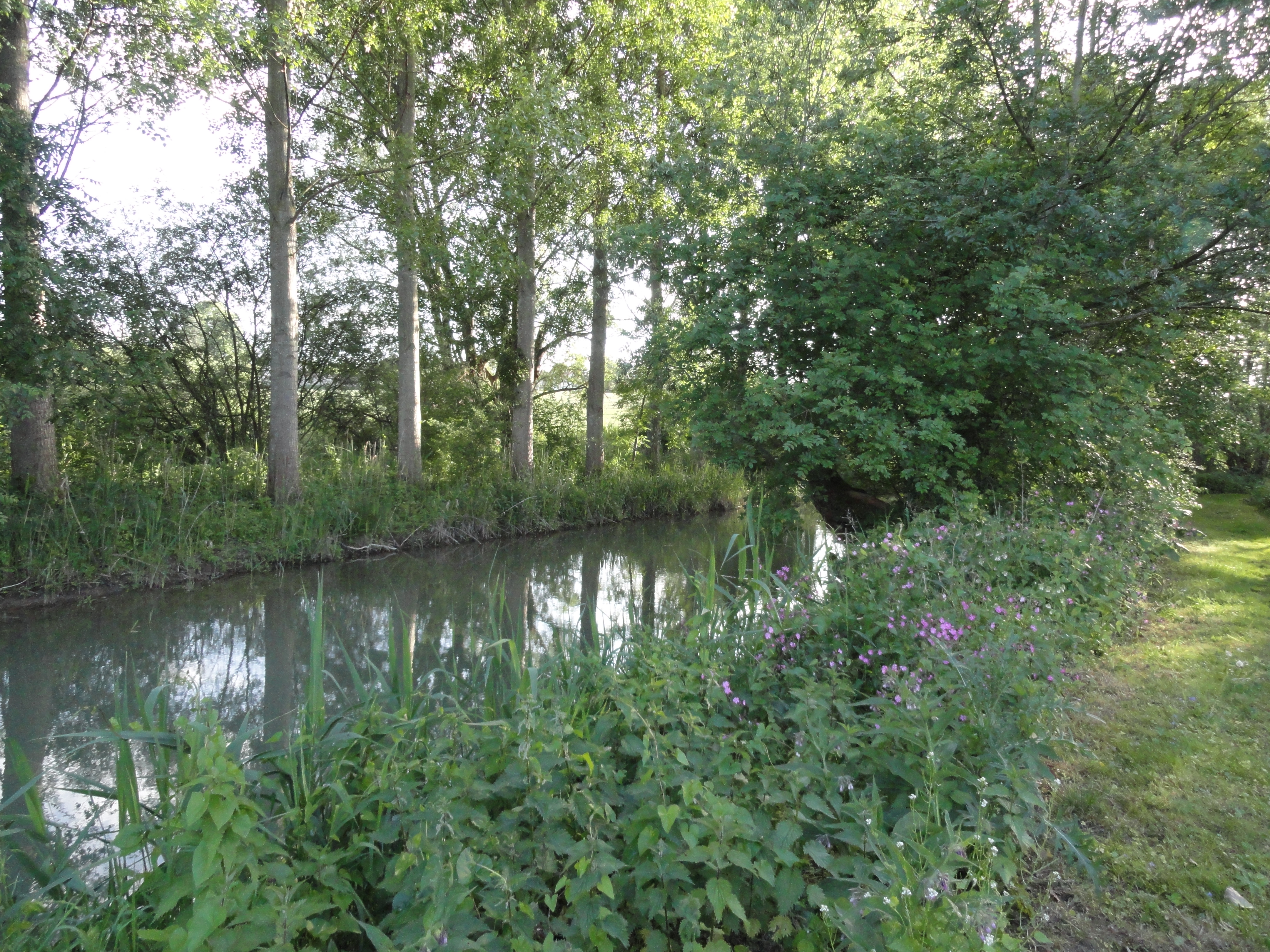 Les Tarnauds, le long des chemins des Tarnauds.